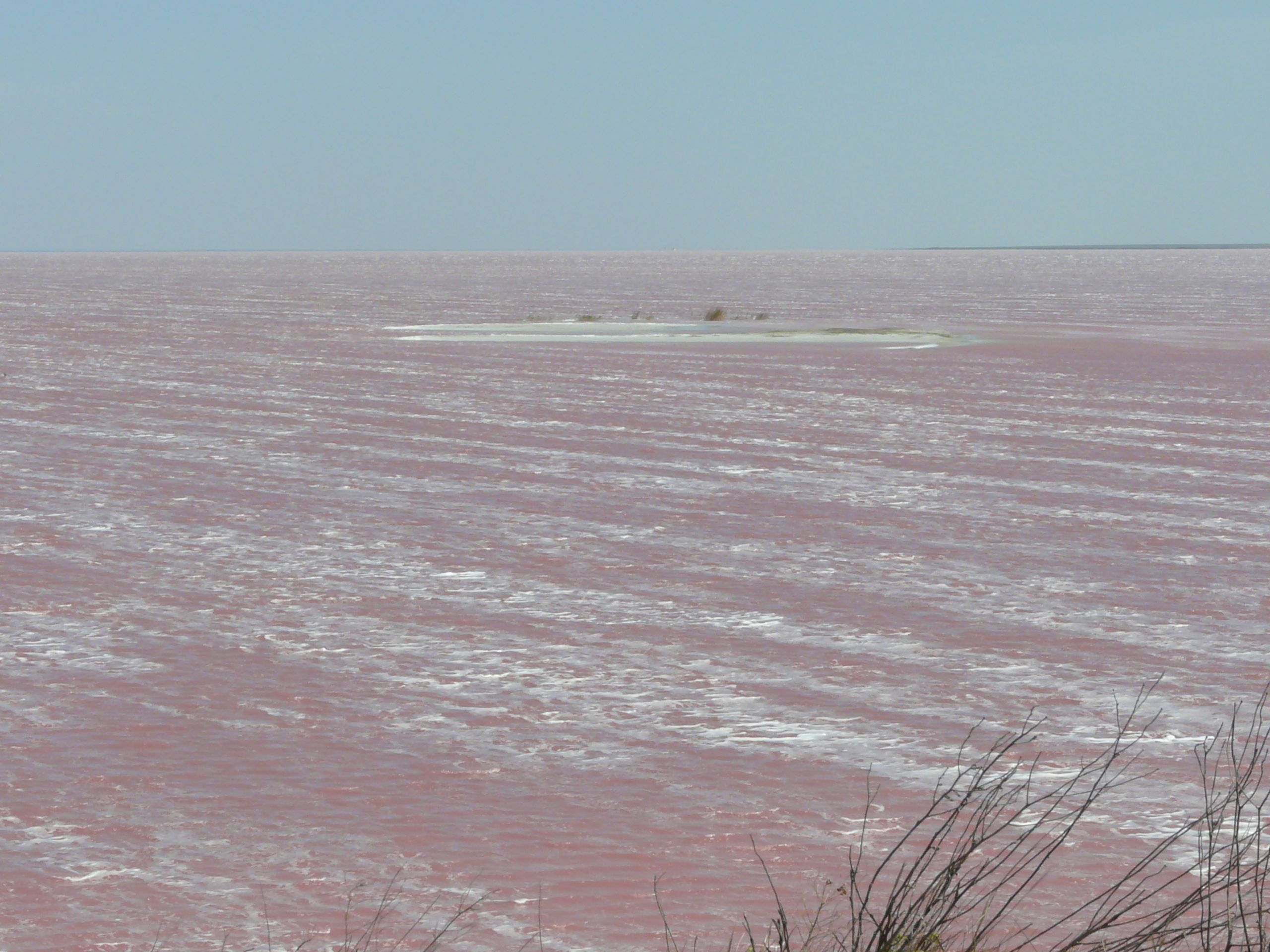 Im Wasser des Salzsees Siwasch (engl. Sivash) leben seltene Mikroalgen Dunaliella Salina. Zum eigenen Schutz im extrem salzigen Wasser des Siwaschsees unter der strahlenden Sonne produzieren die Mikroalgen über 30 verschiedene Carotinoide und vor allem das Beta-Carotin.